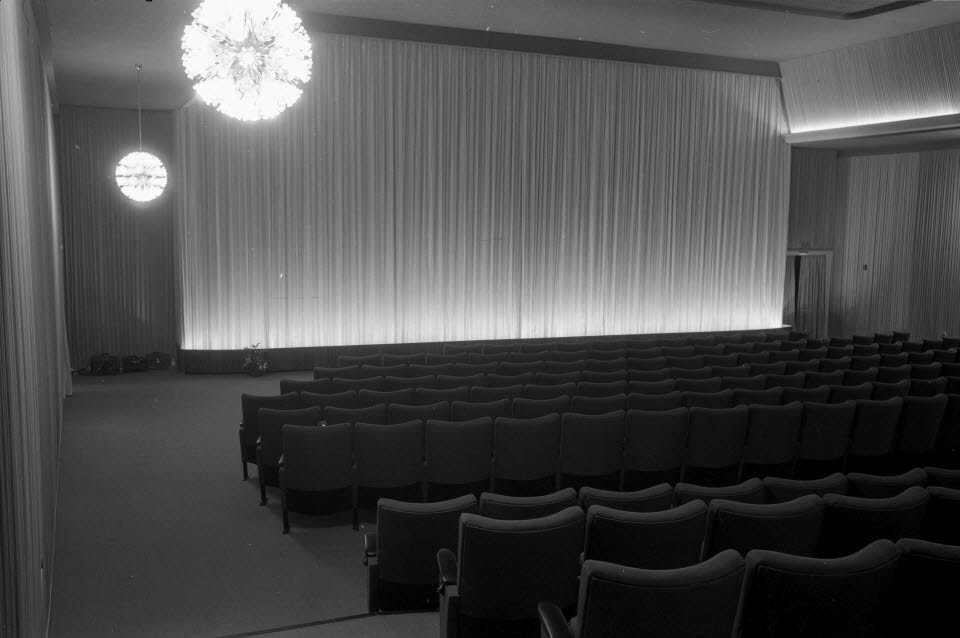 Vorführsaal.